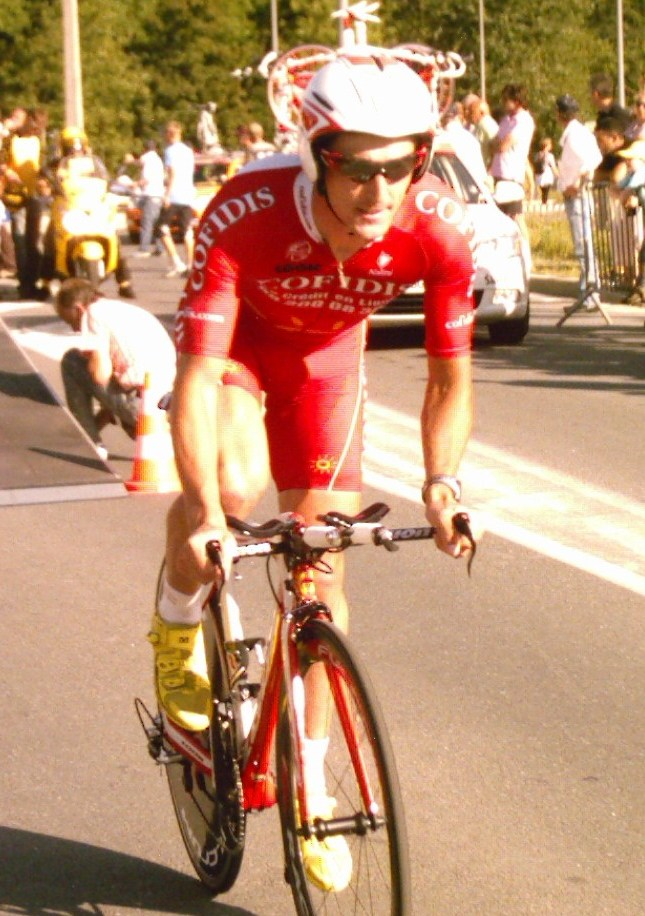 Jean-Eudes Demaret au départ du contre-la-montre de la troisième étape b du Tour de l'Ain 2009.